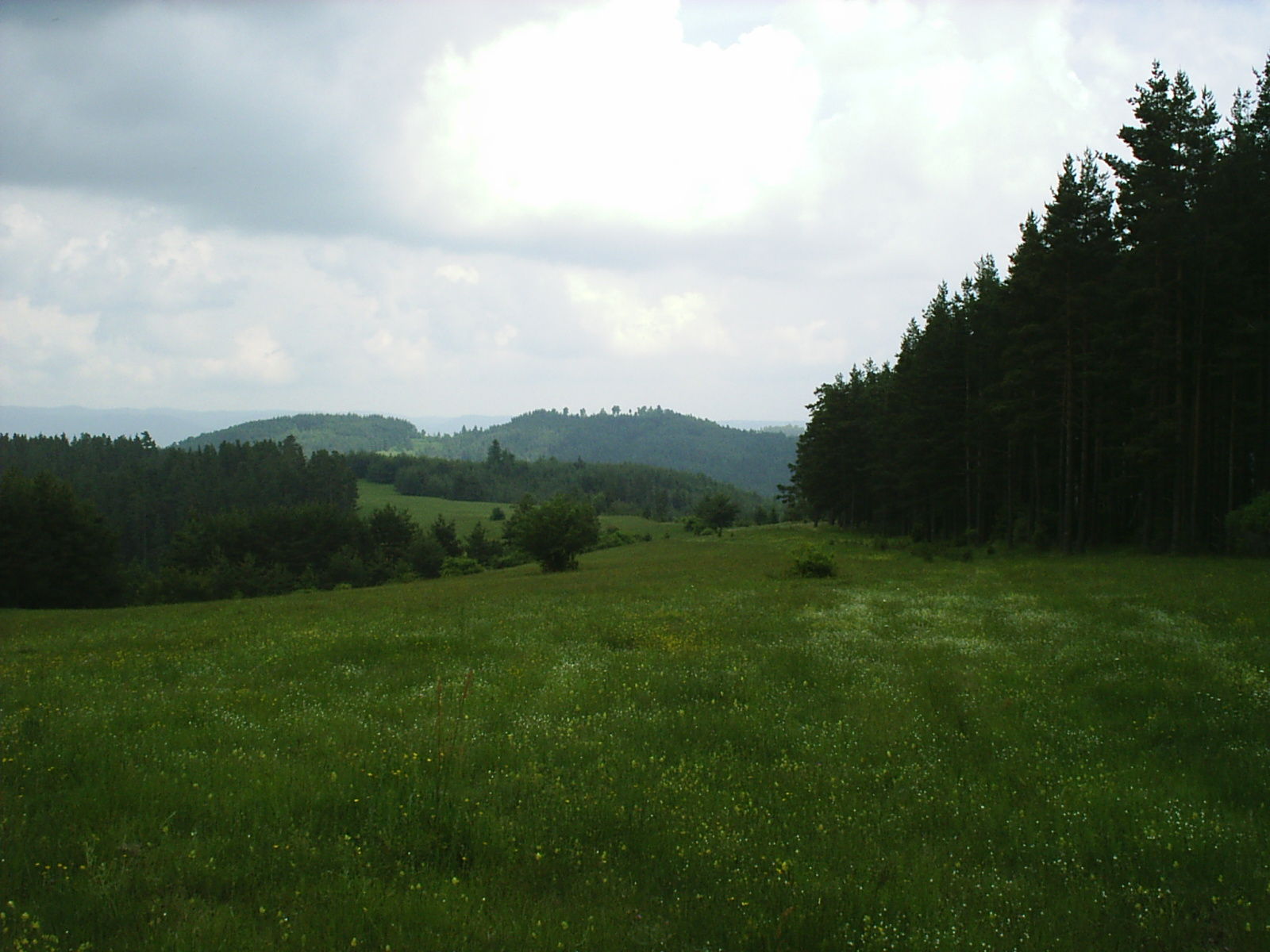 Поляната пред входа на резервата.